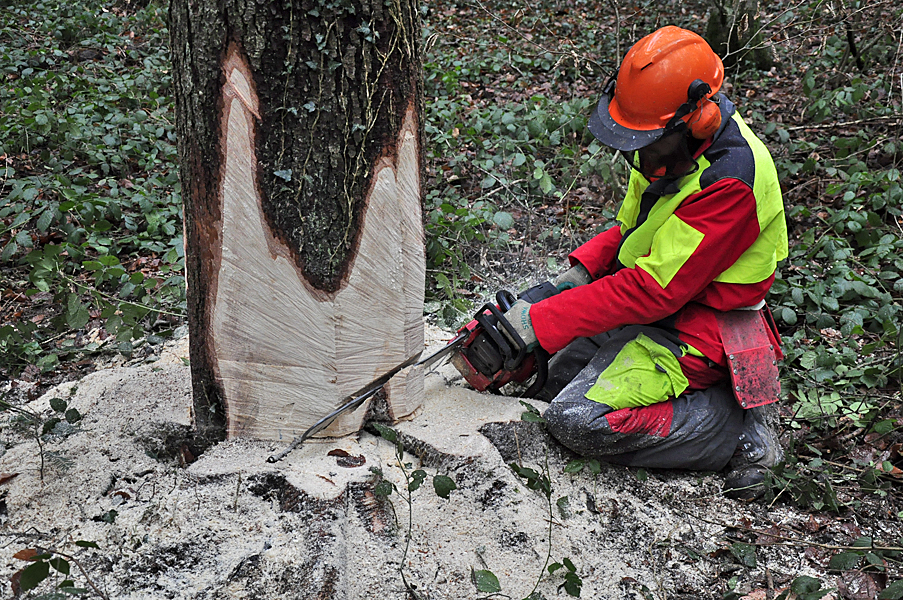 Professioneller Holzfäller am Werk